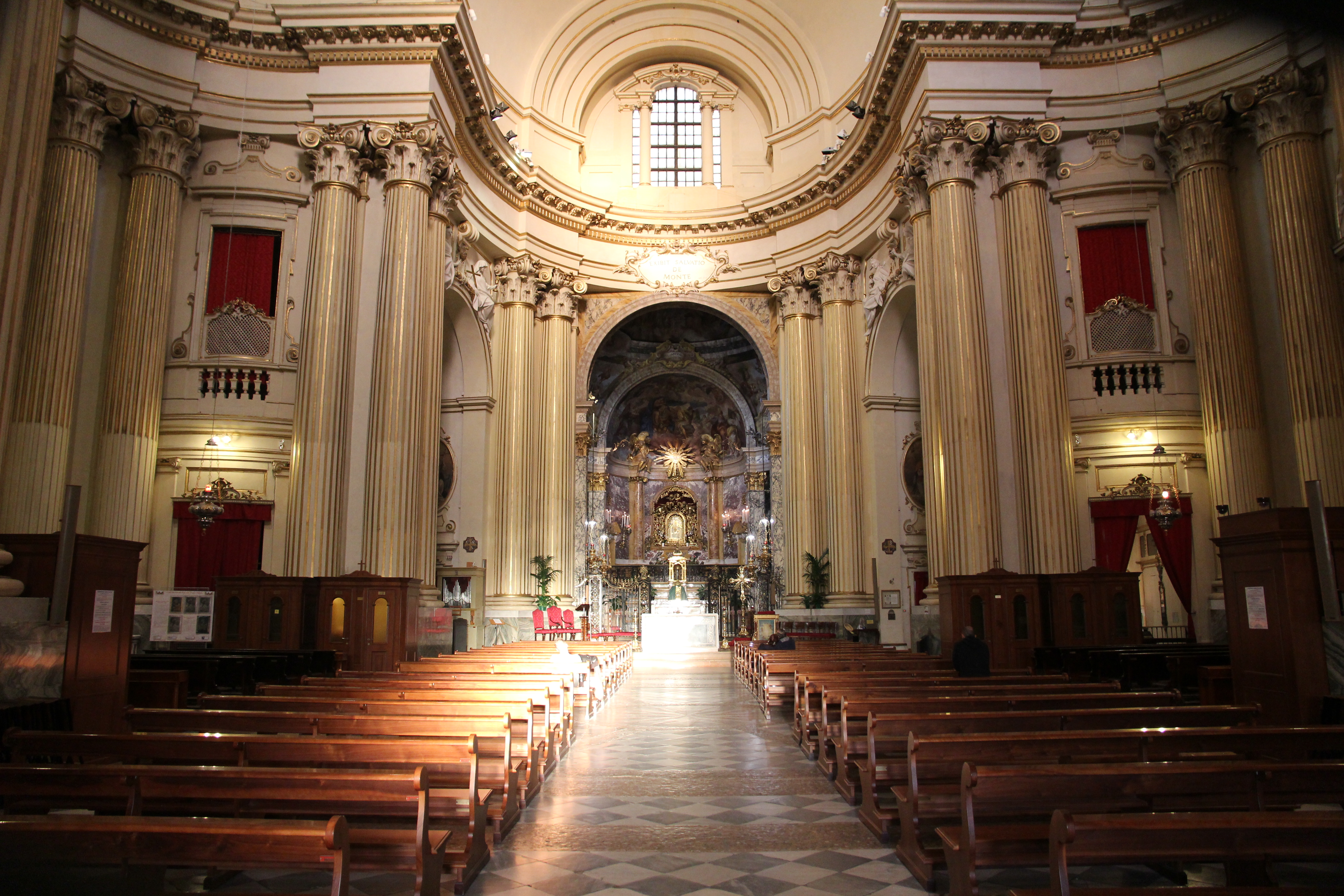 Bologna, santuario della Madonna di San Luca This is a photo of a monument which is part of cultural heritage of Italy.